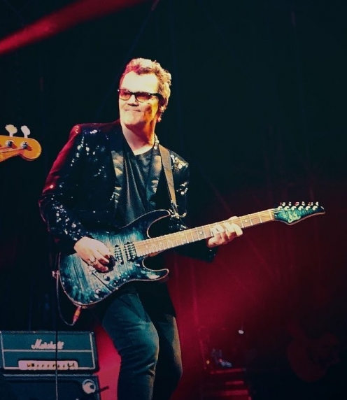 Axel Bauer guitariste